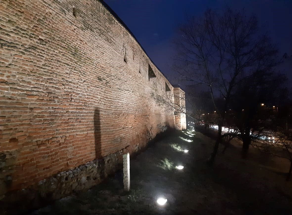 Pohľad z lávky z Hlbokej ulice.